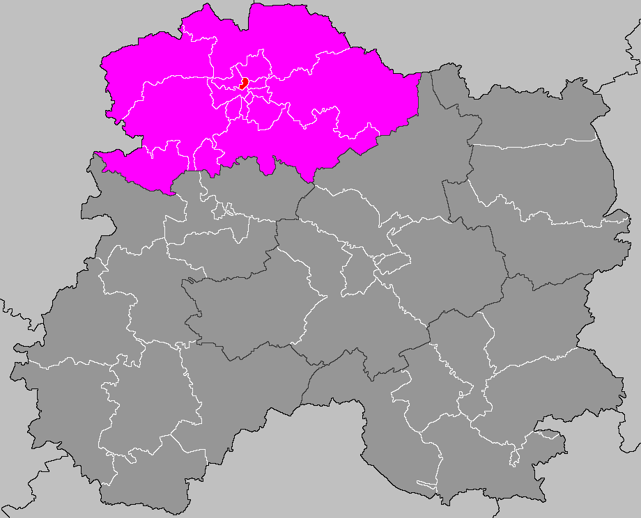 Localisation du canton de Reims-10